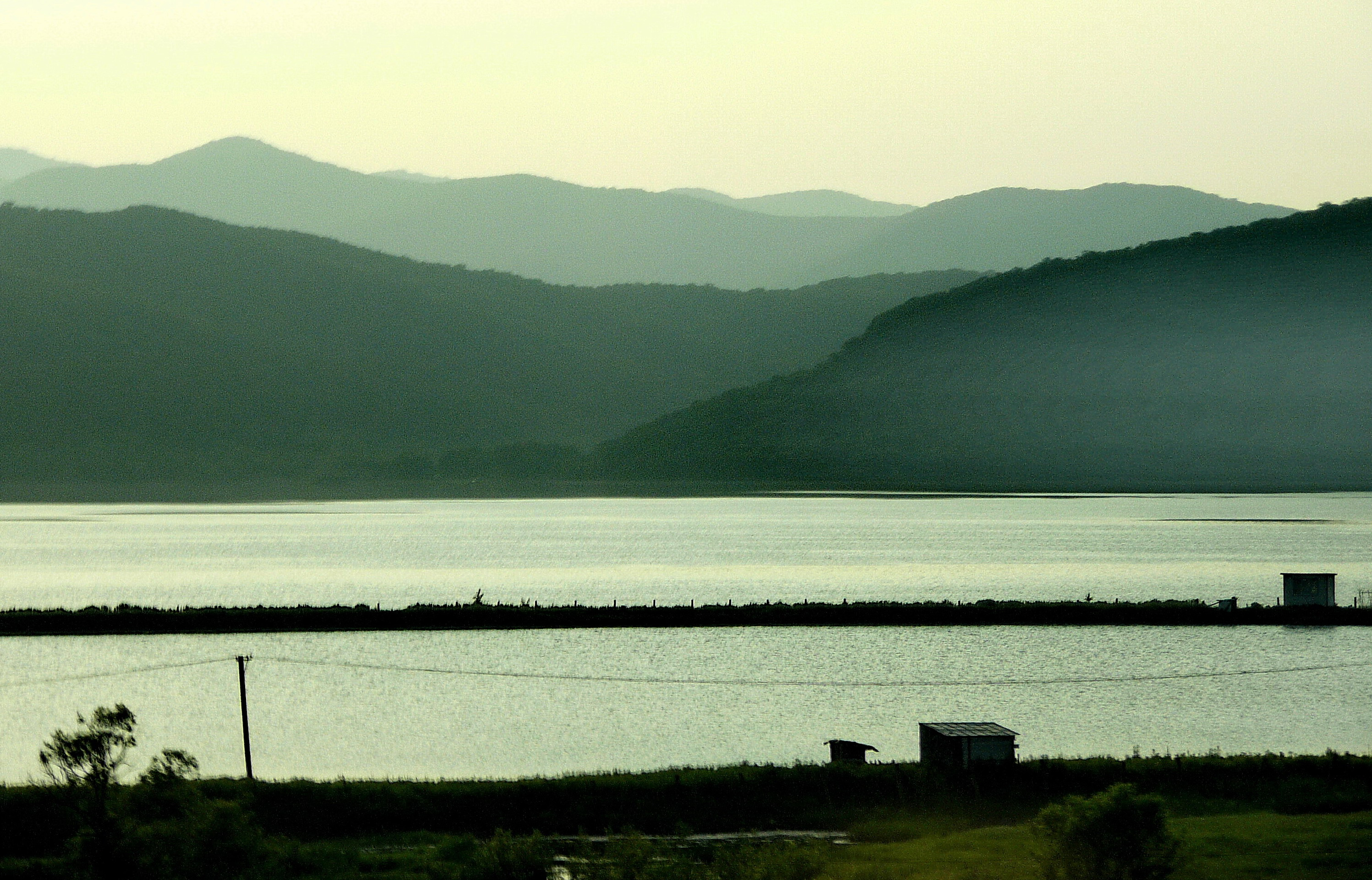 牡丹江 Mudan River